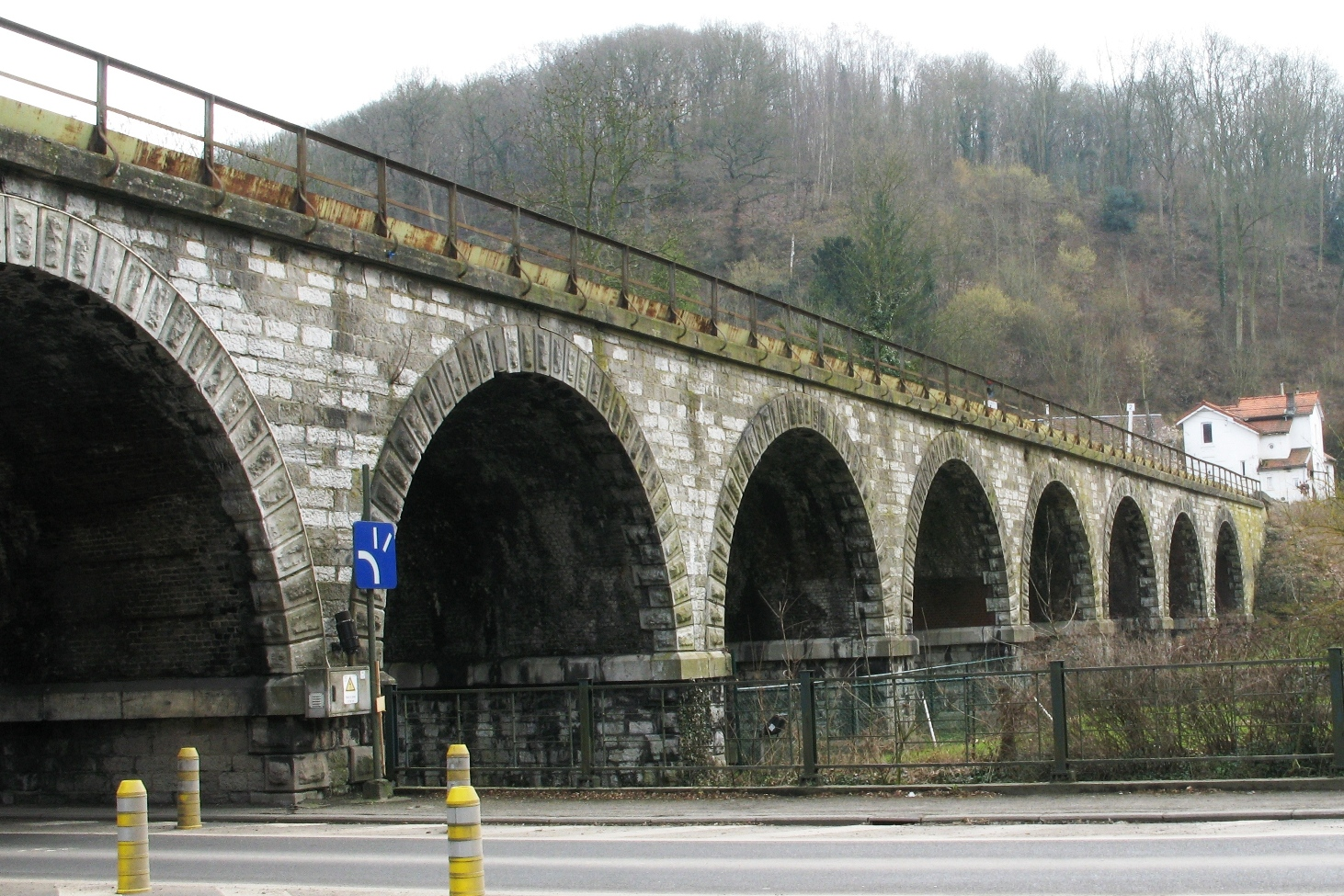 De Viaduc vu Chinet 2009. Chinet Viaduc